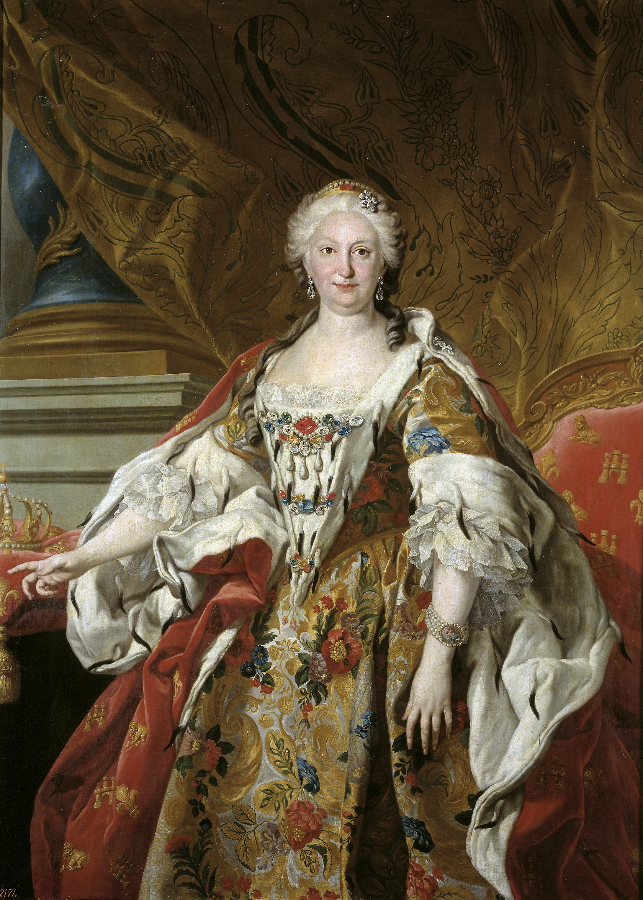 Retrato de la reina Isabel de Farnesio (1692-1766), hija de Eduardo II Farnesio, heredero de los ducados de Parma y Plasencia, y de Dorotea Sofía de Neoburgo, y reina consorte de España por su matrimonio con Felipe V, de quien fue su segunda esposa.